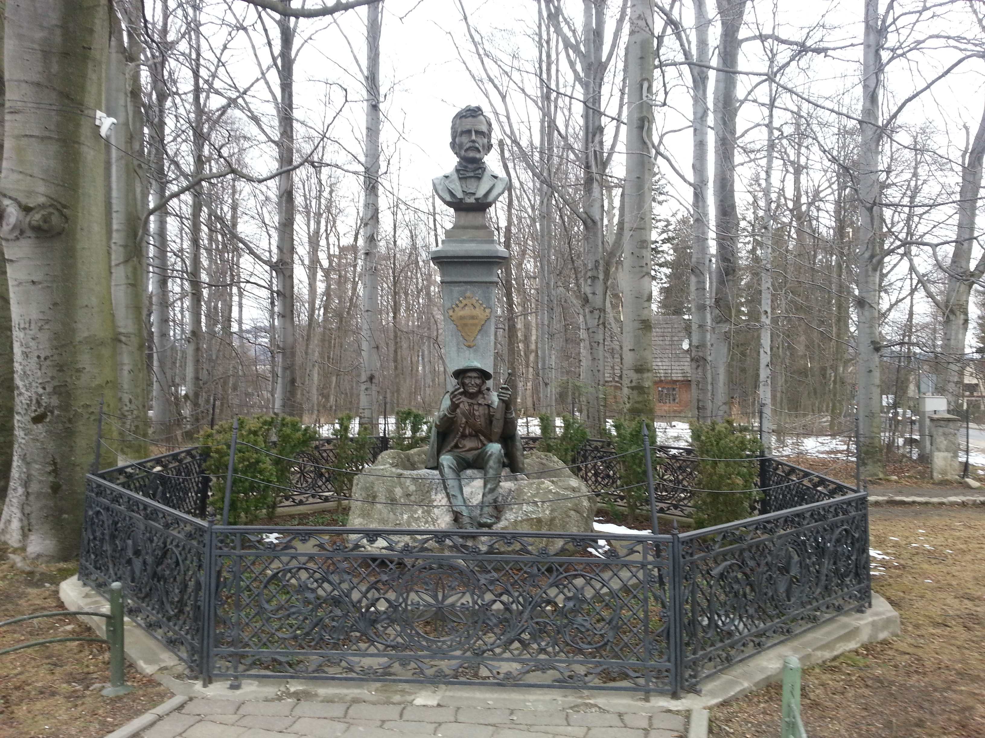 Pomnik Tytusa Chałubińskiego i Sabały w Zakopanem u zbiegu Chałubińskiego i Zamoyskiego.